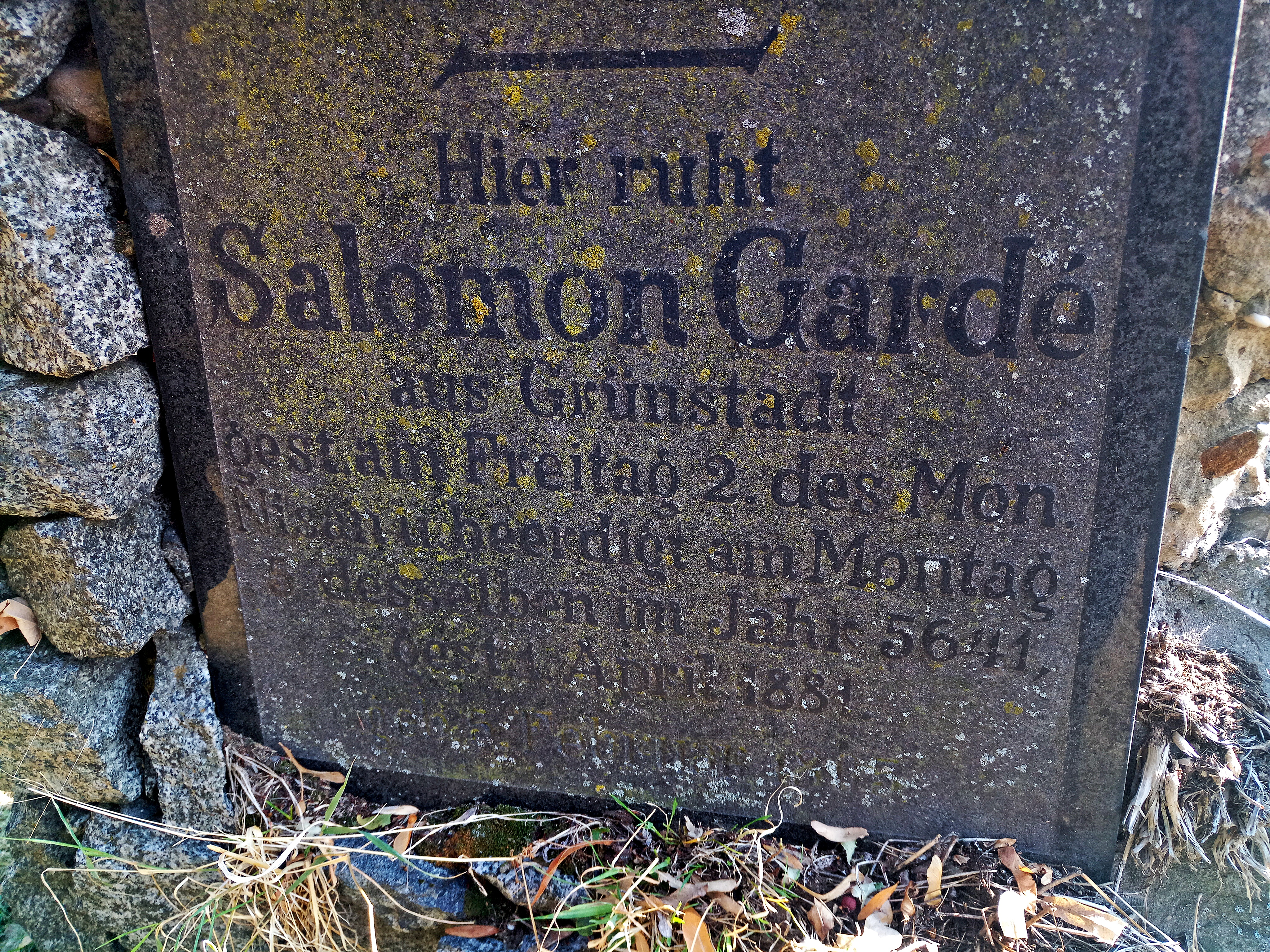 Grünstadt Judenfriedhof Grabinschrift Salomon Gardé, gest. im Monat Nisan 5641 (=1881)